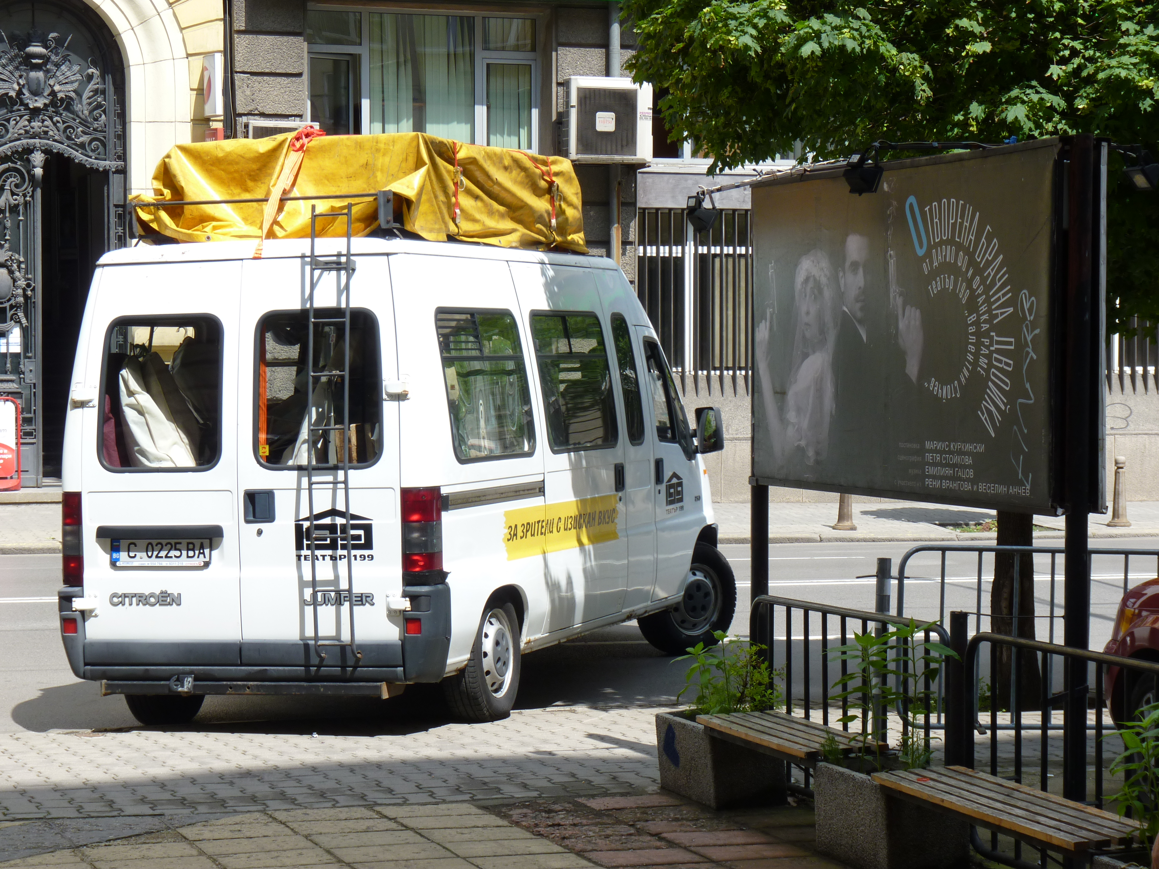 Екипът на Театър 199 потегля с буса на турне.